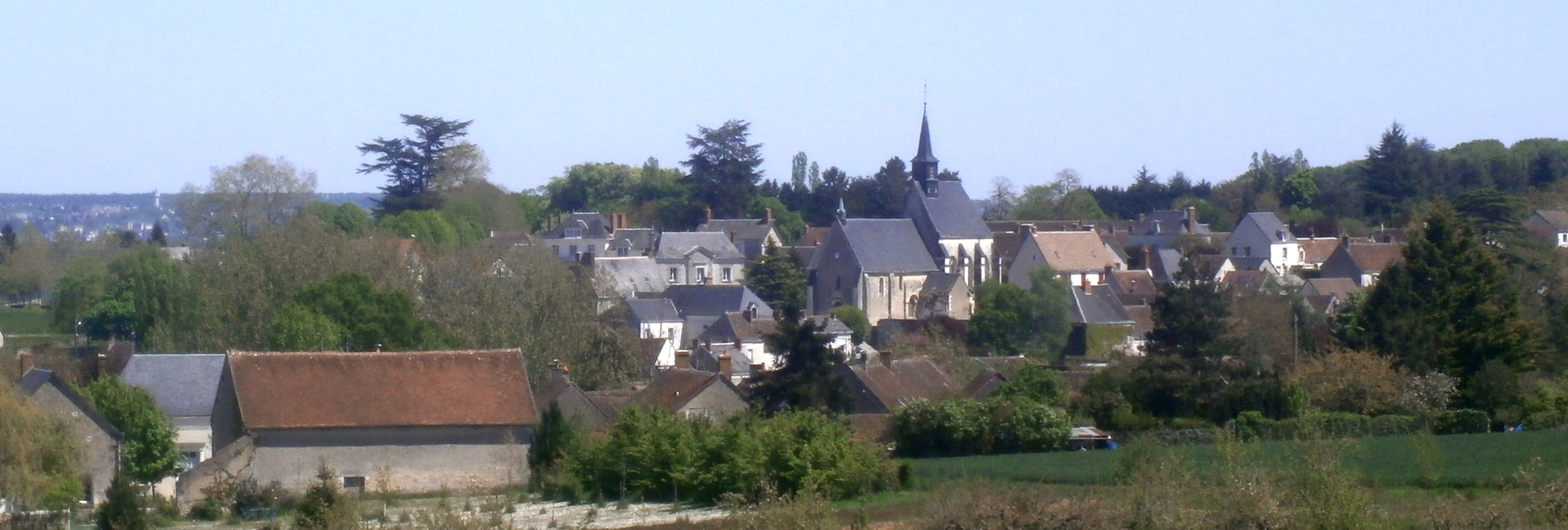 Panorama général du village de Francueil.